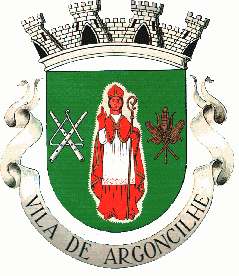 Brasão da Vila de Argoncilhe.